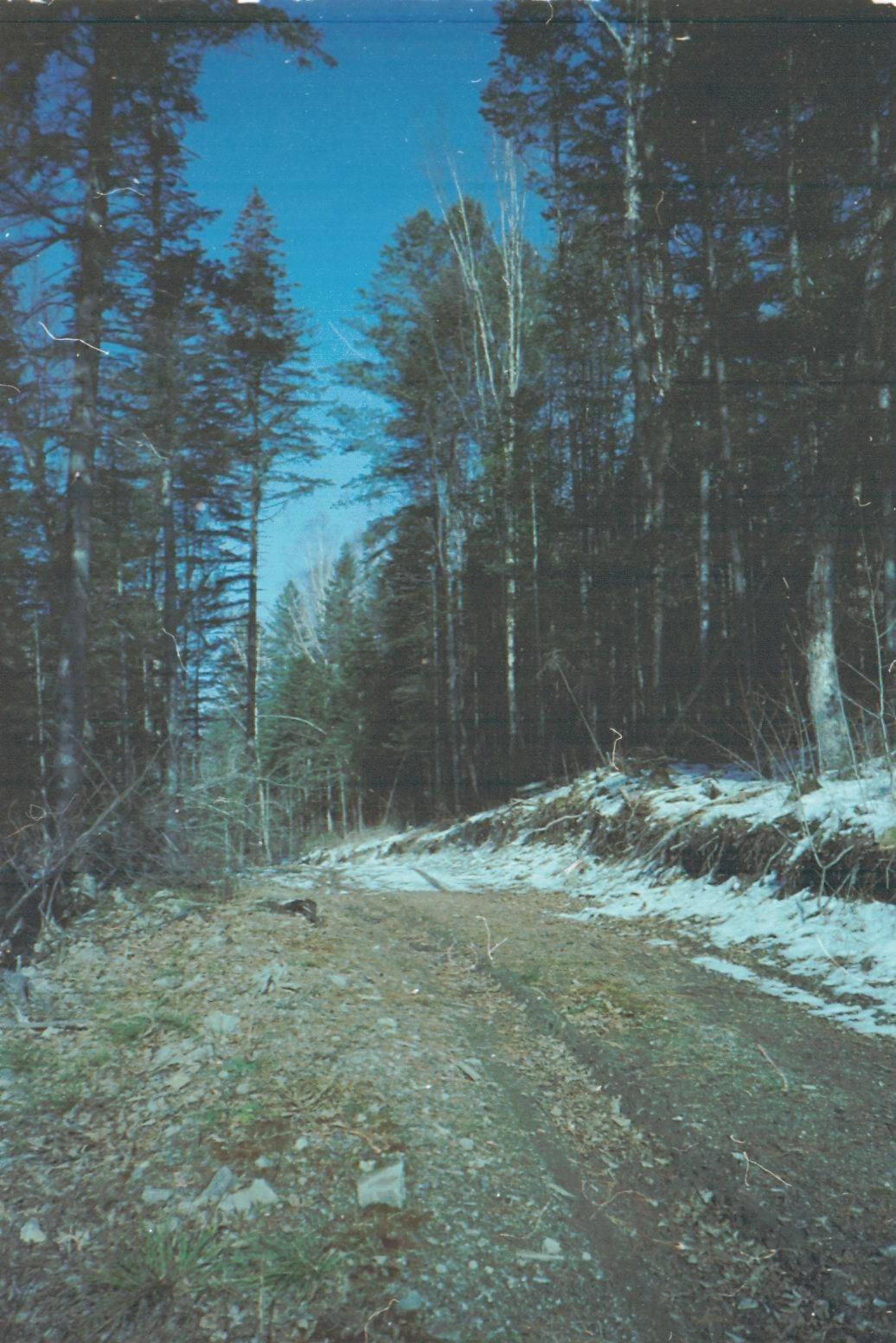 Лесовозная дорога в Приморском крае, Ольгинский район (1995 год)